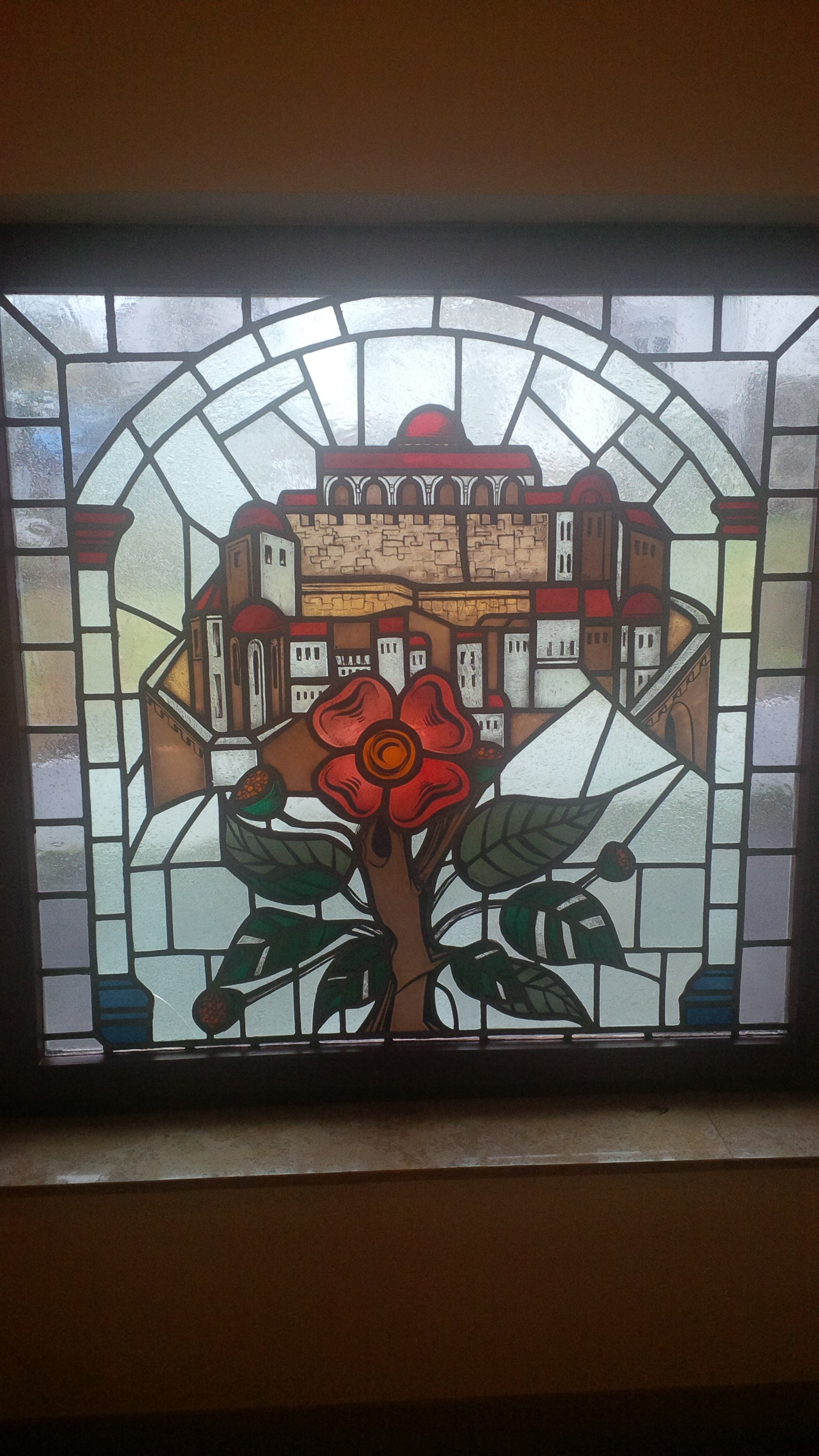 Zionskirche in Allendorf/Lumda, Landkreis Gießen, Hessen, Deutschland